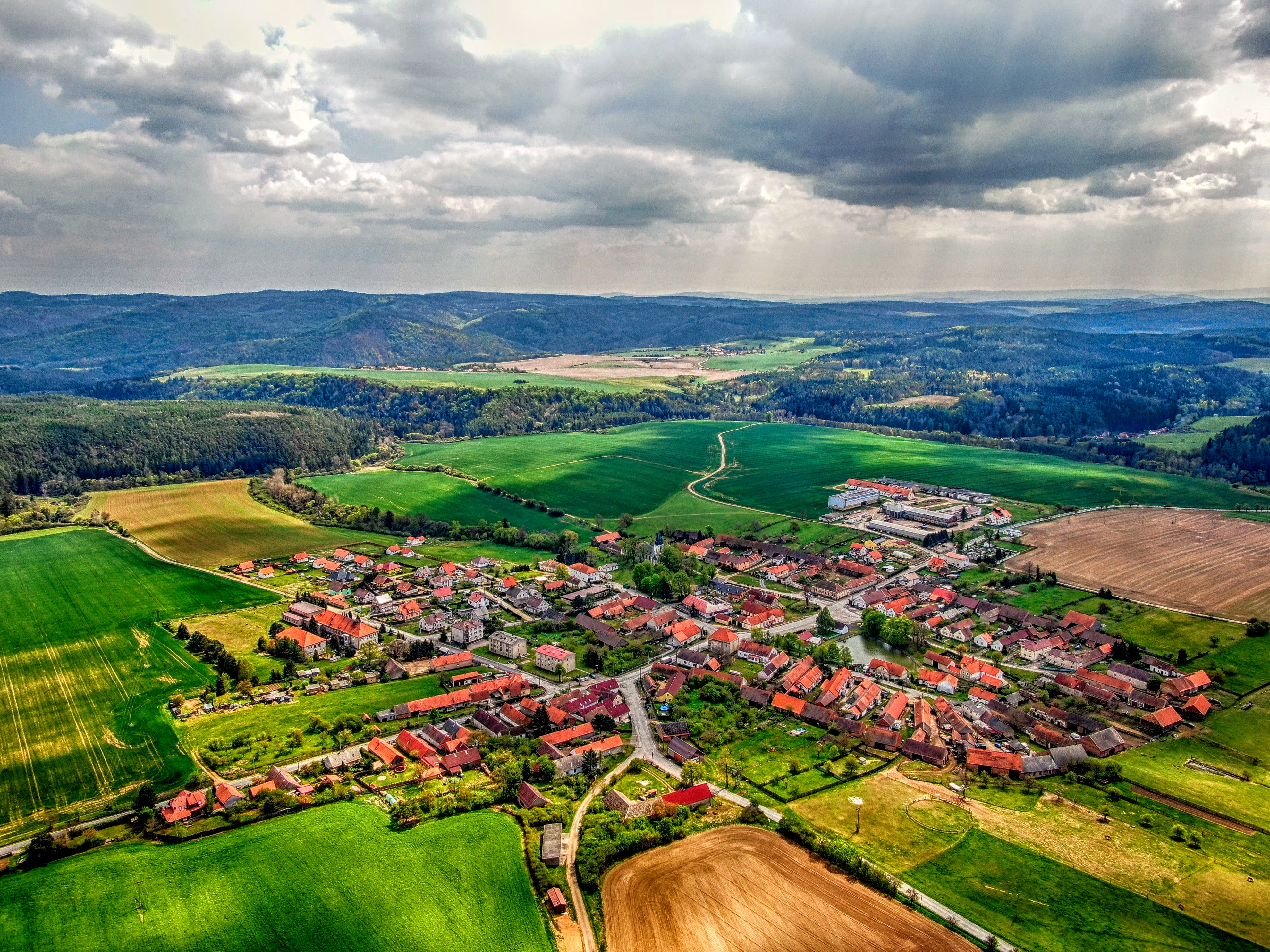 Autorem fotky: p. Z. Rídl